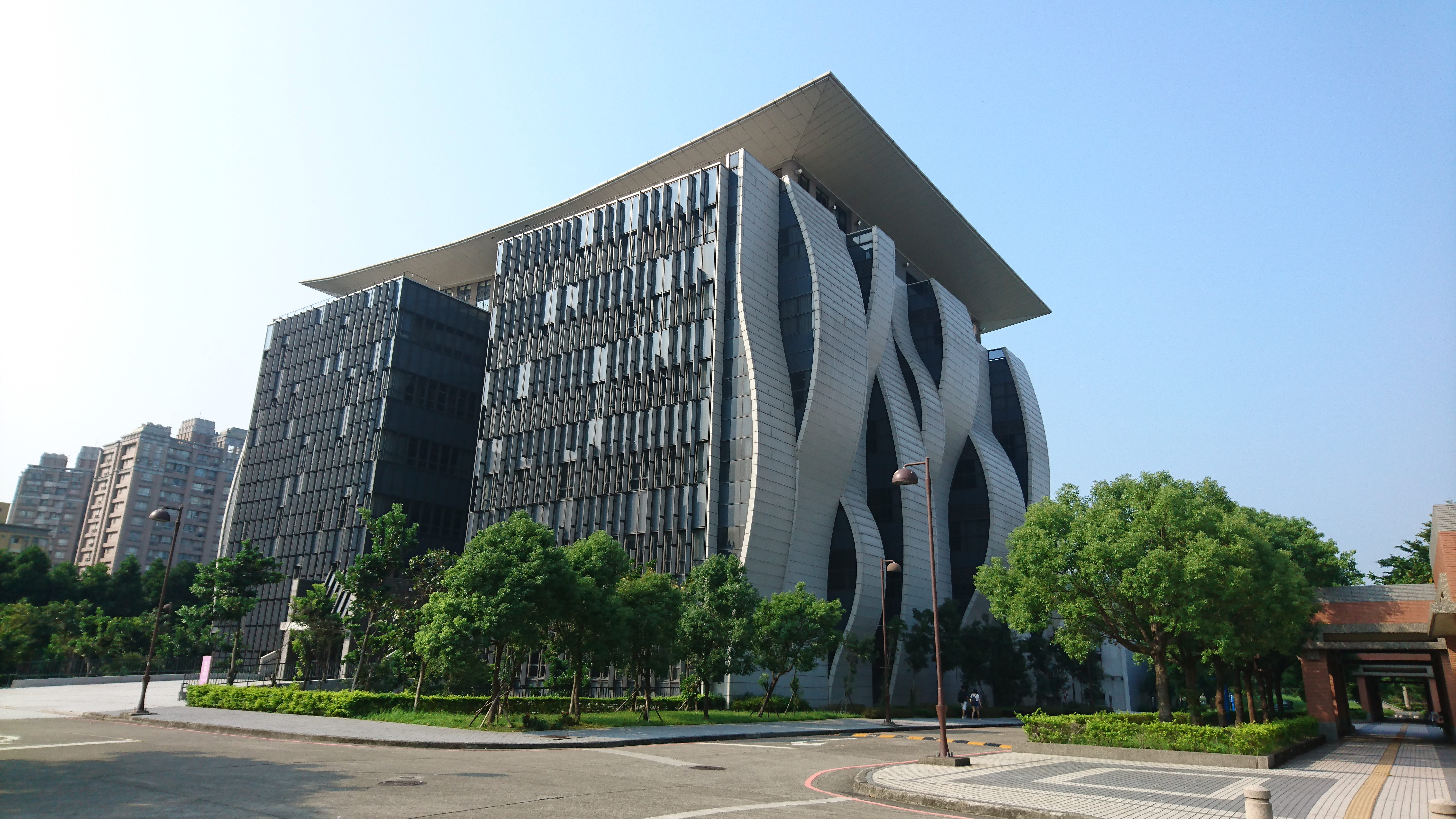 中文（台灣）: 國立臺北大學三峽校區圖書資訊大樓。